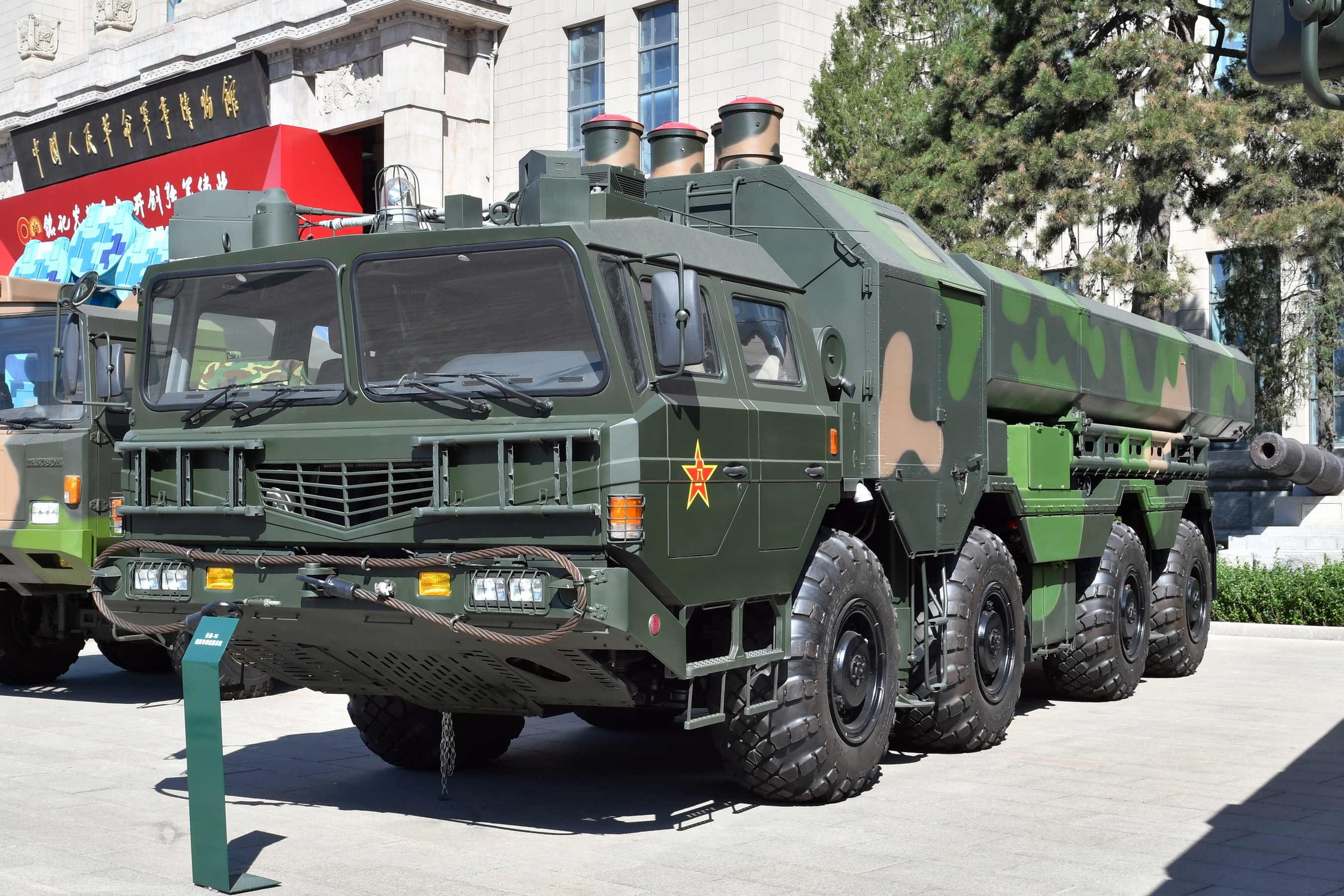 中国人民革命军事博物馆纪念中国人民解放军建军90周年主题展览展出的长剑-10巡航导弹发射车。